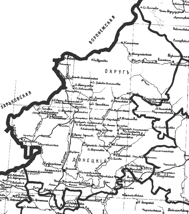 Карта Донецкого округа ОВД со столицей в Каменской